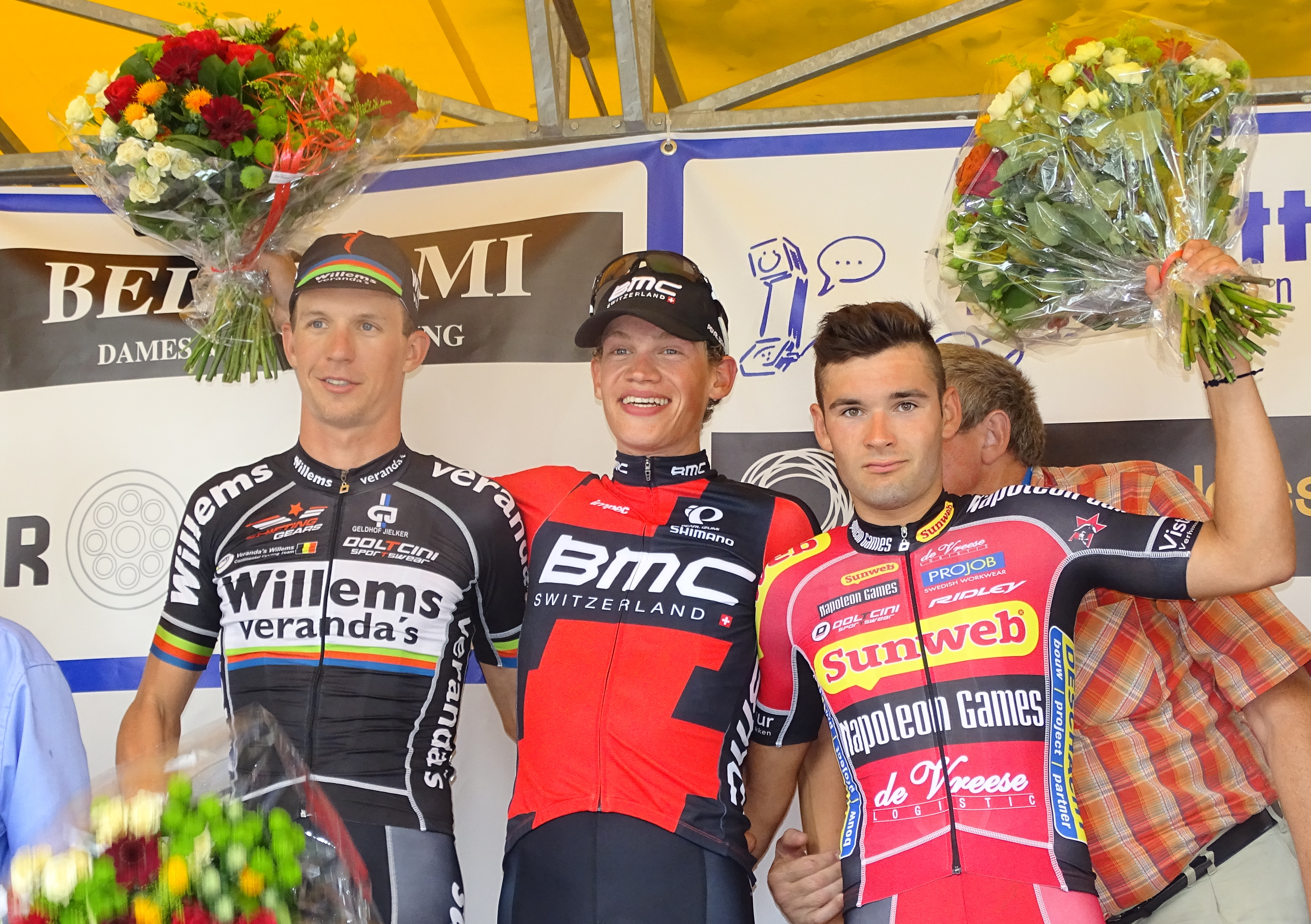 Reportage réalisé le samedi 4 juillet à l'occasion du départ et de l'arrivée du Circuit Het Nieuwsblad espoirs 2015 à Grotenberge (Zottegem), Belgique.